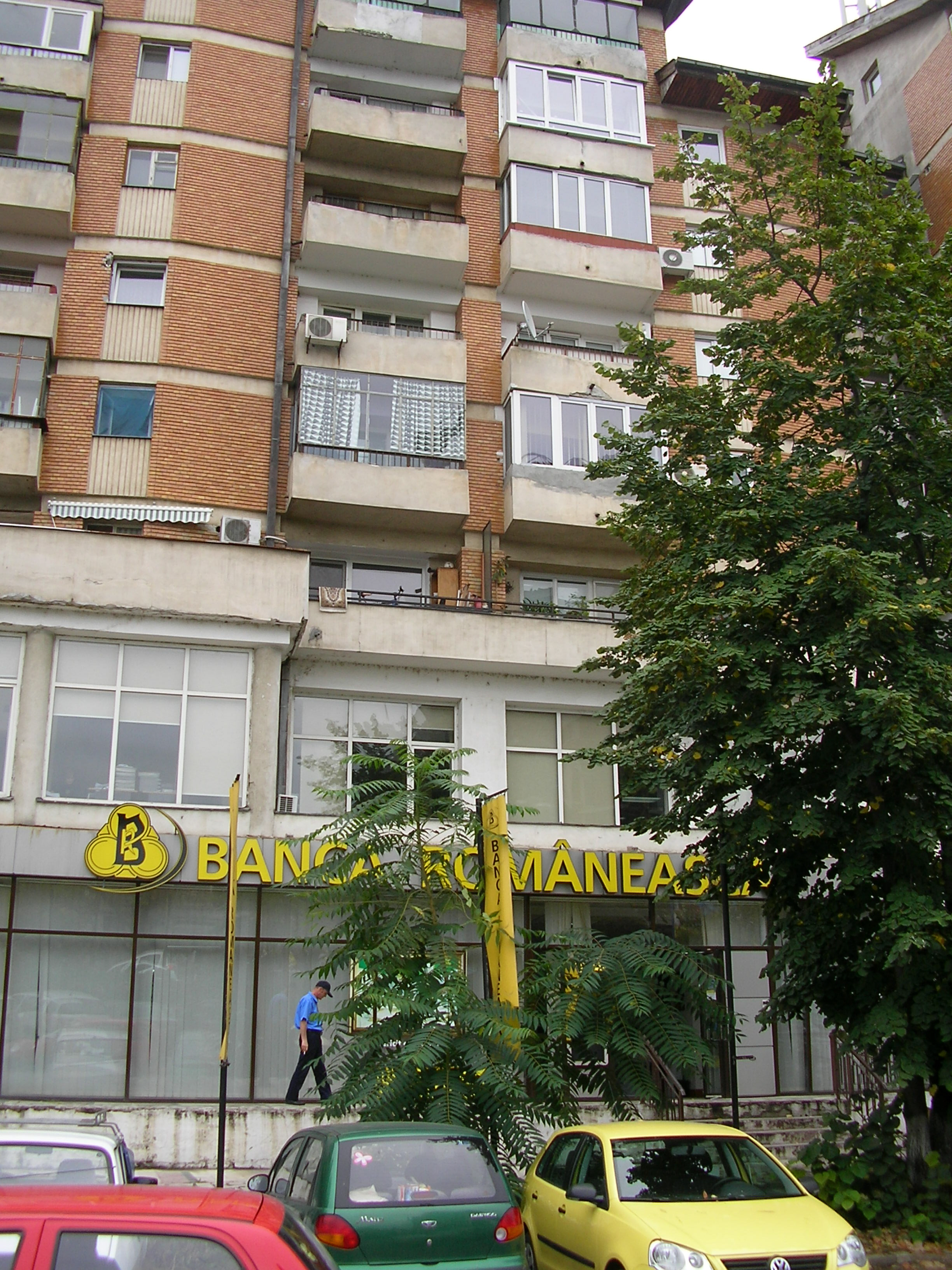 Banca Românească office in Băneasa, Bucharest